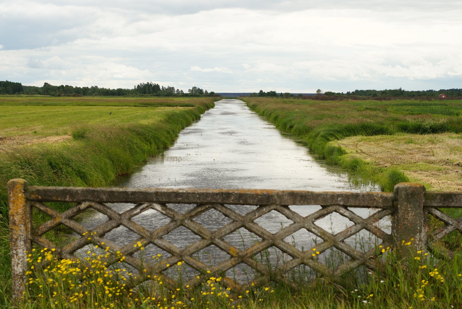 Жучка рэчка